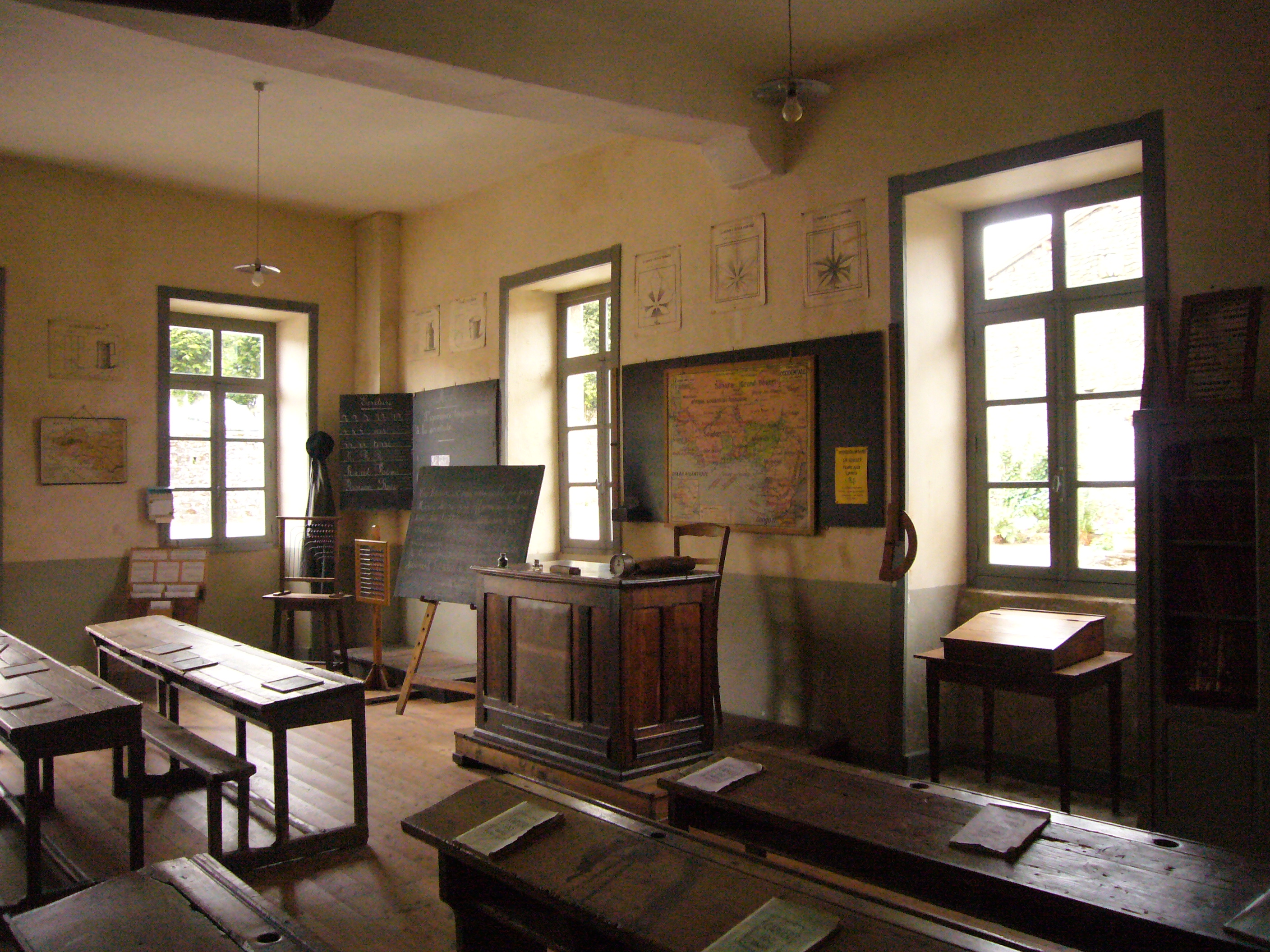 Salle de classe de l'école communale 1900 de Montrol-Sénard (Haute-Vienne, France)